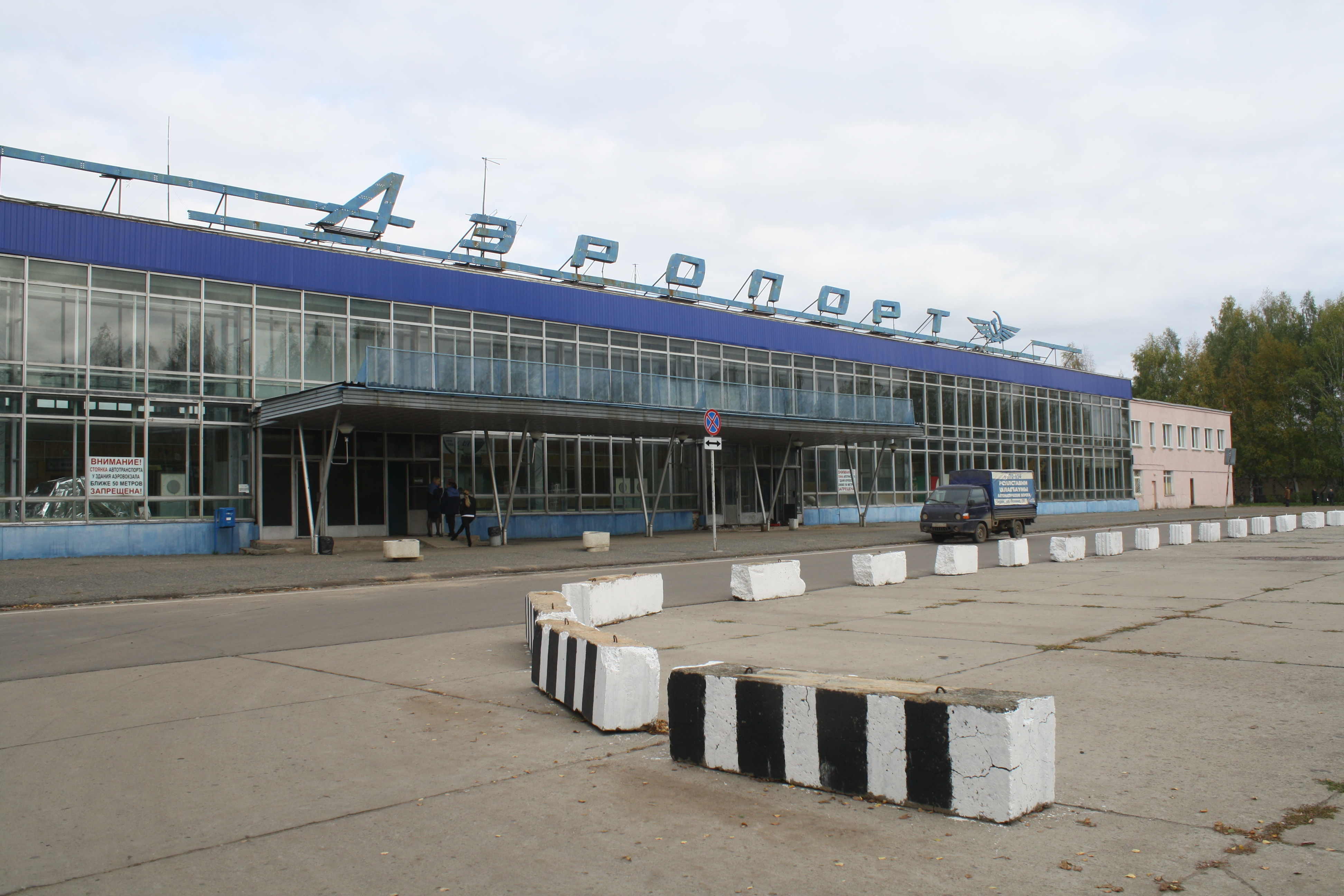 Pobedilovo airport. Kirov. Russia. Аэропорт Победилово. Киров. Россия